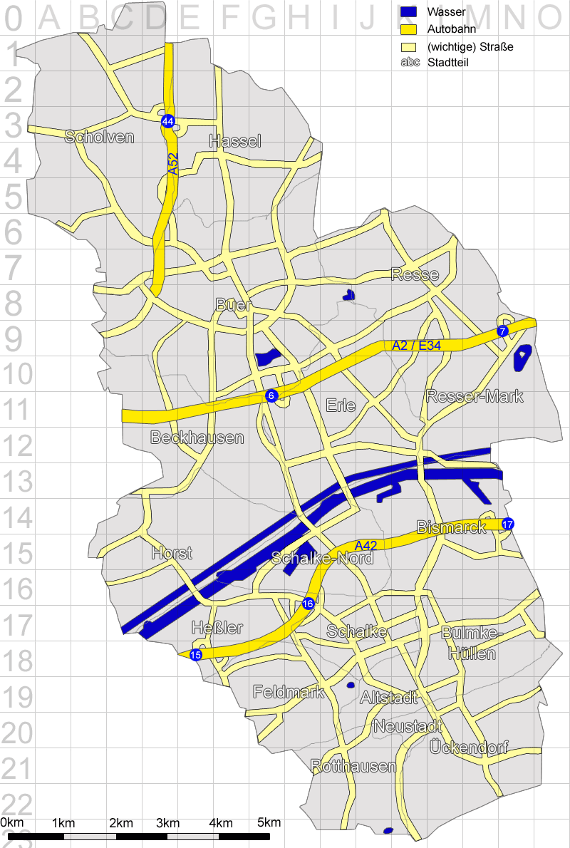 Beschreibung: Selbst erstelle Karte von Gelsenkirchen mit den Straßen und den 18 Stadtteilen im Raster. Description: Self-provided map of Gelsenkirchen with its streets and quarters in a grid. Quelle/Source: Selbst erstellt / Self-provided Autor/Author: Marc Schuelper